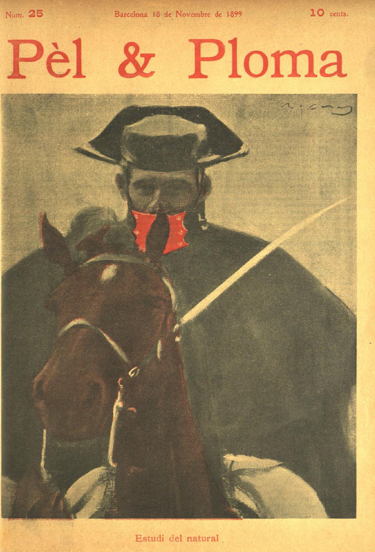 Portada del n.25 de la revista Pel i Ploma de novembre-1899 amb un dibuix preparatori de La Càrrega. Obra de Ramon Casas 1899